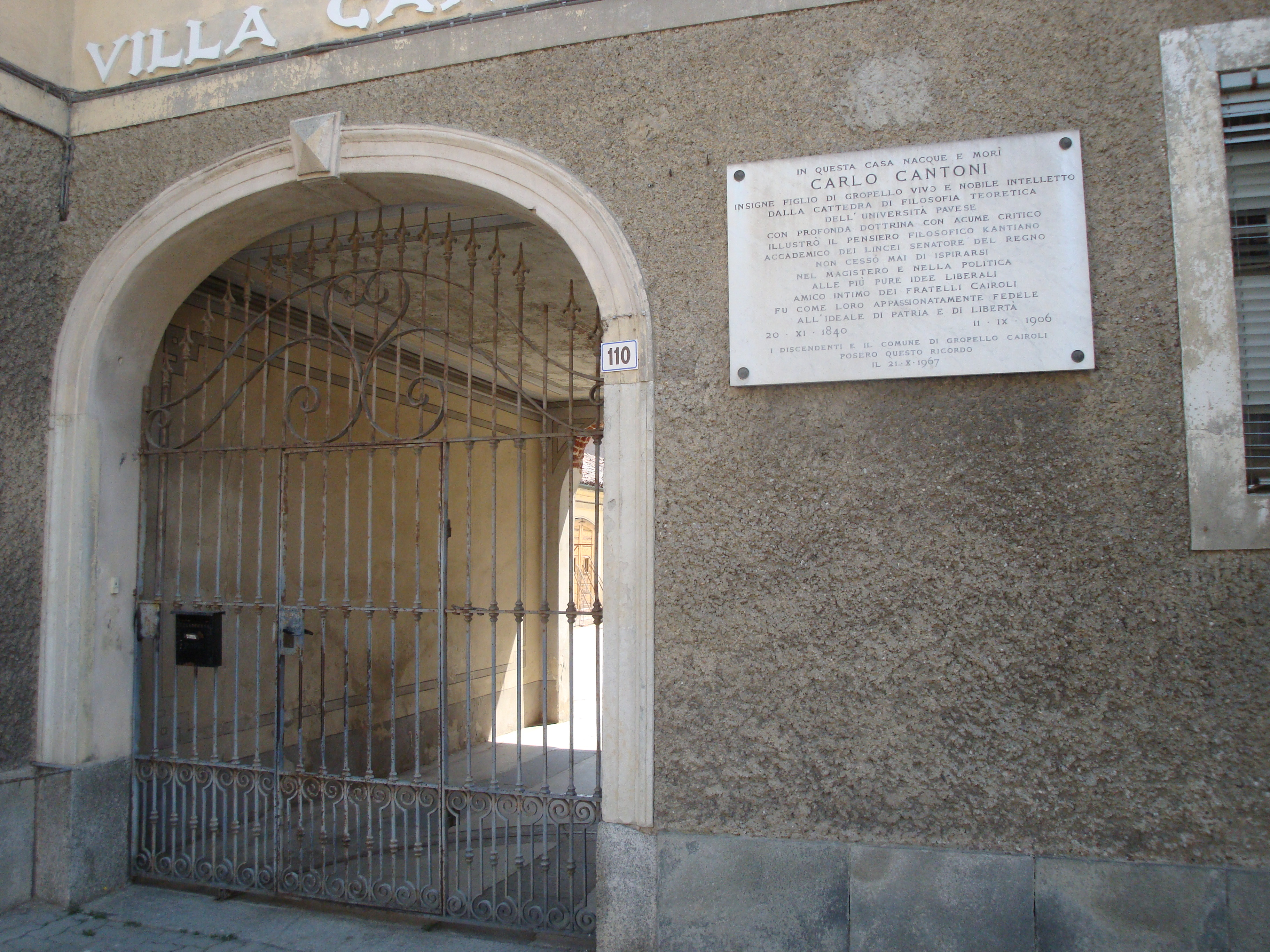 Gropello Cairoli Autore: Tony Frisina - Alessandria